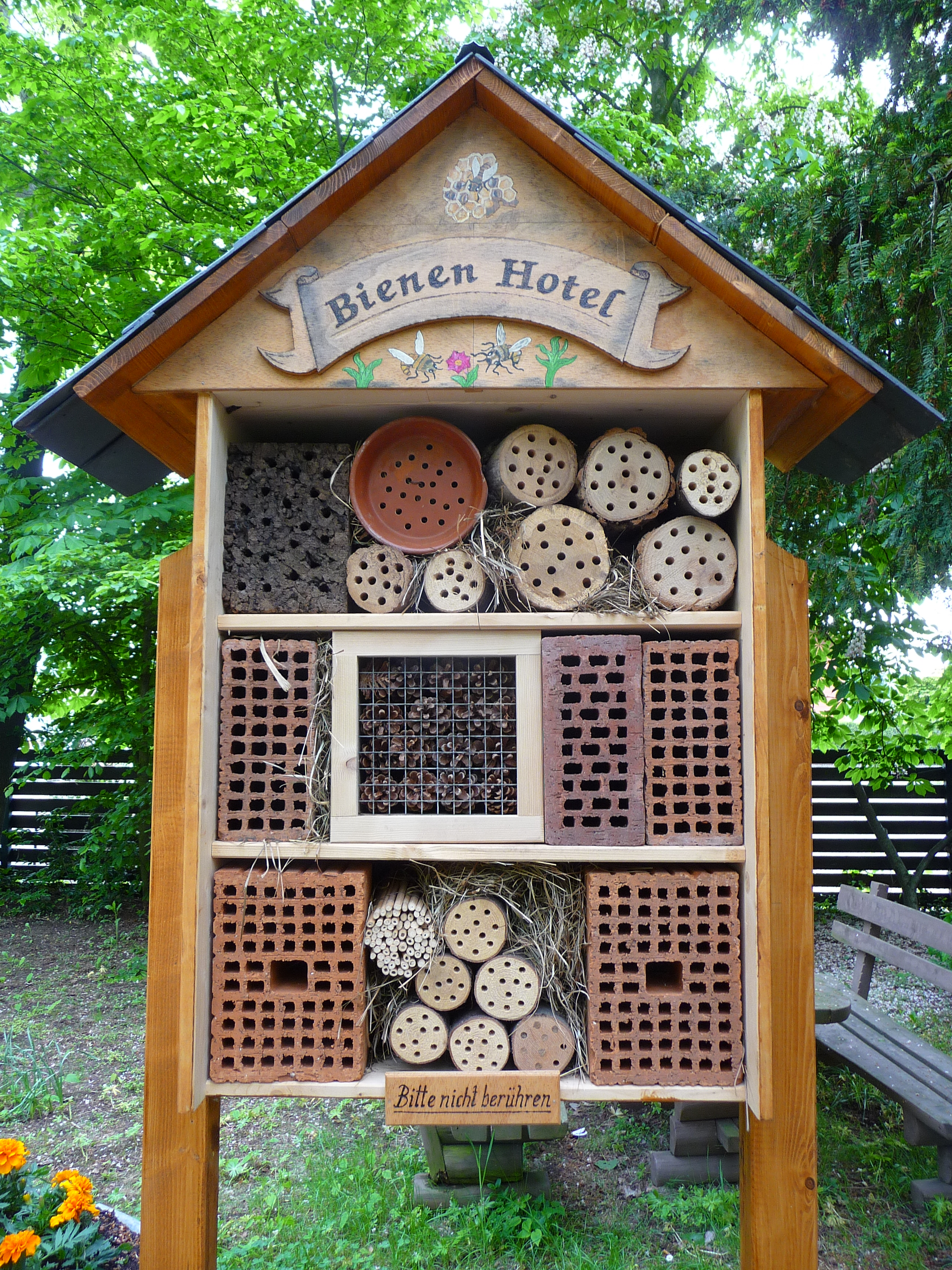 Bienenhotel im Vogelpark Plankstadt (Baden-Württemberg, Deutschland)